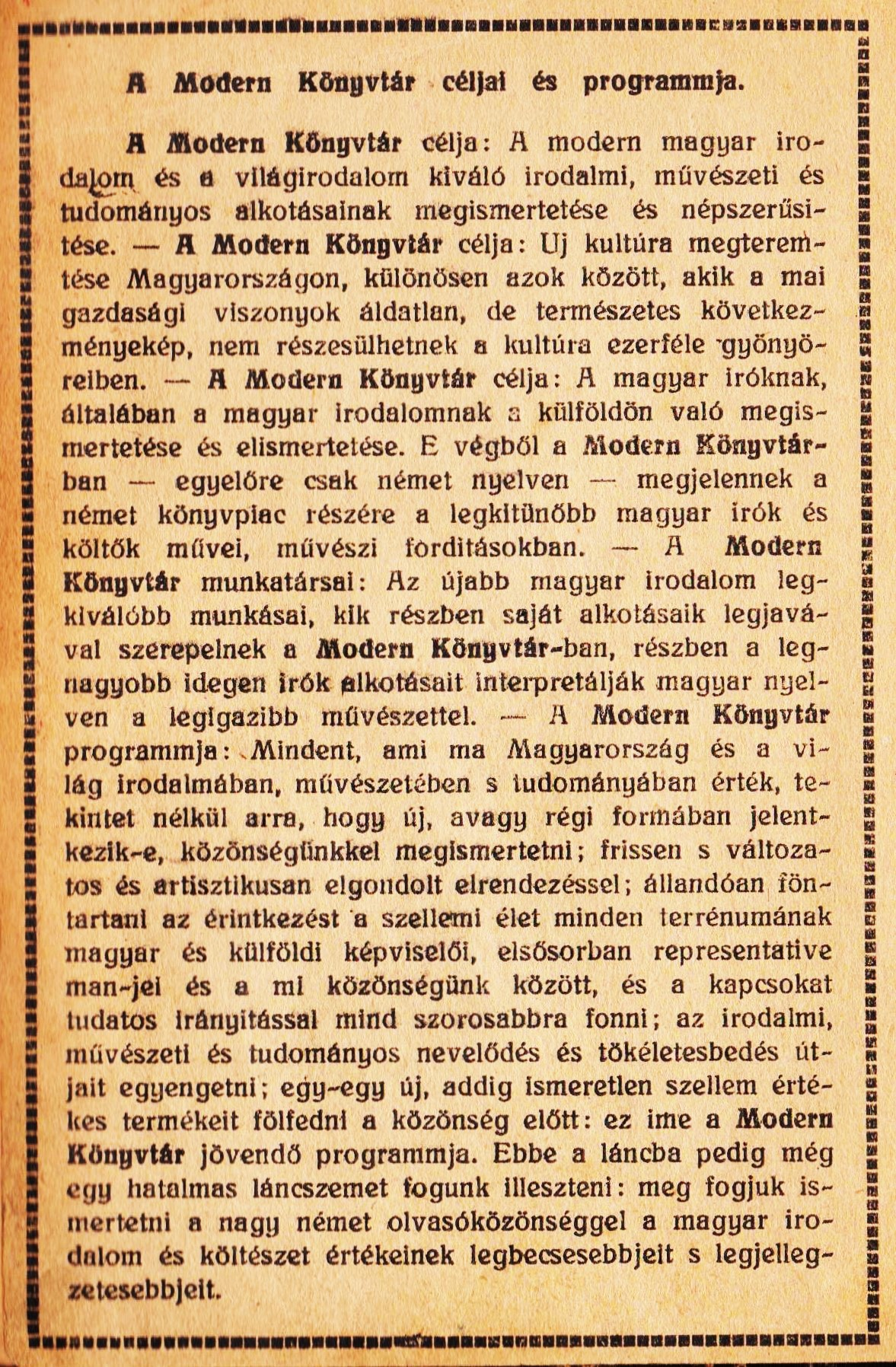 Modern Könyvtár-könyvsorozat hirdetése